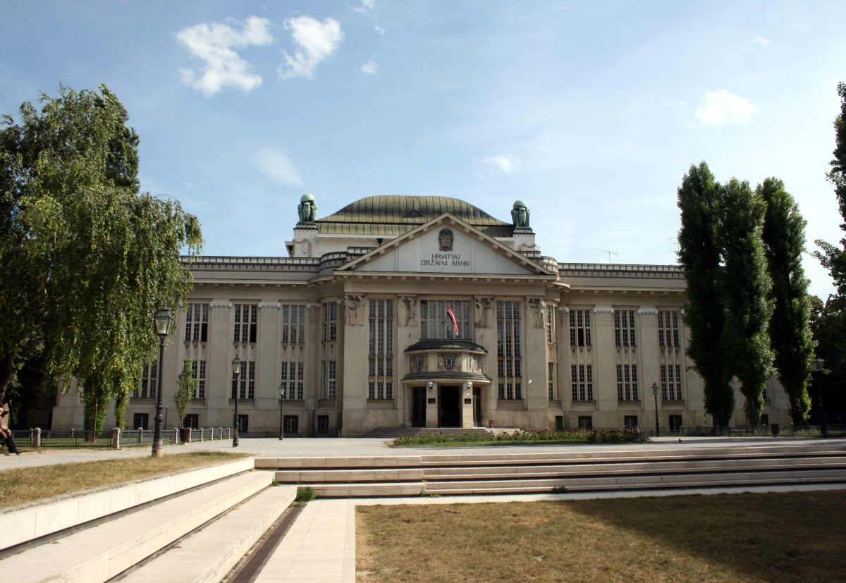 Hrvatski državni arhiv